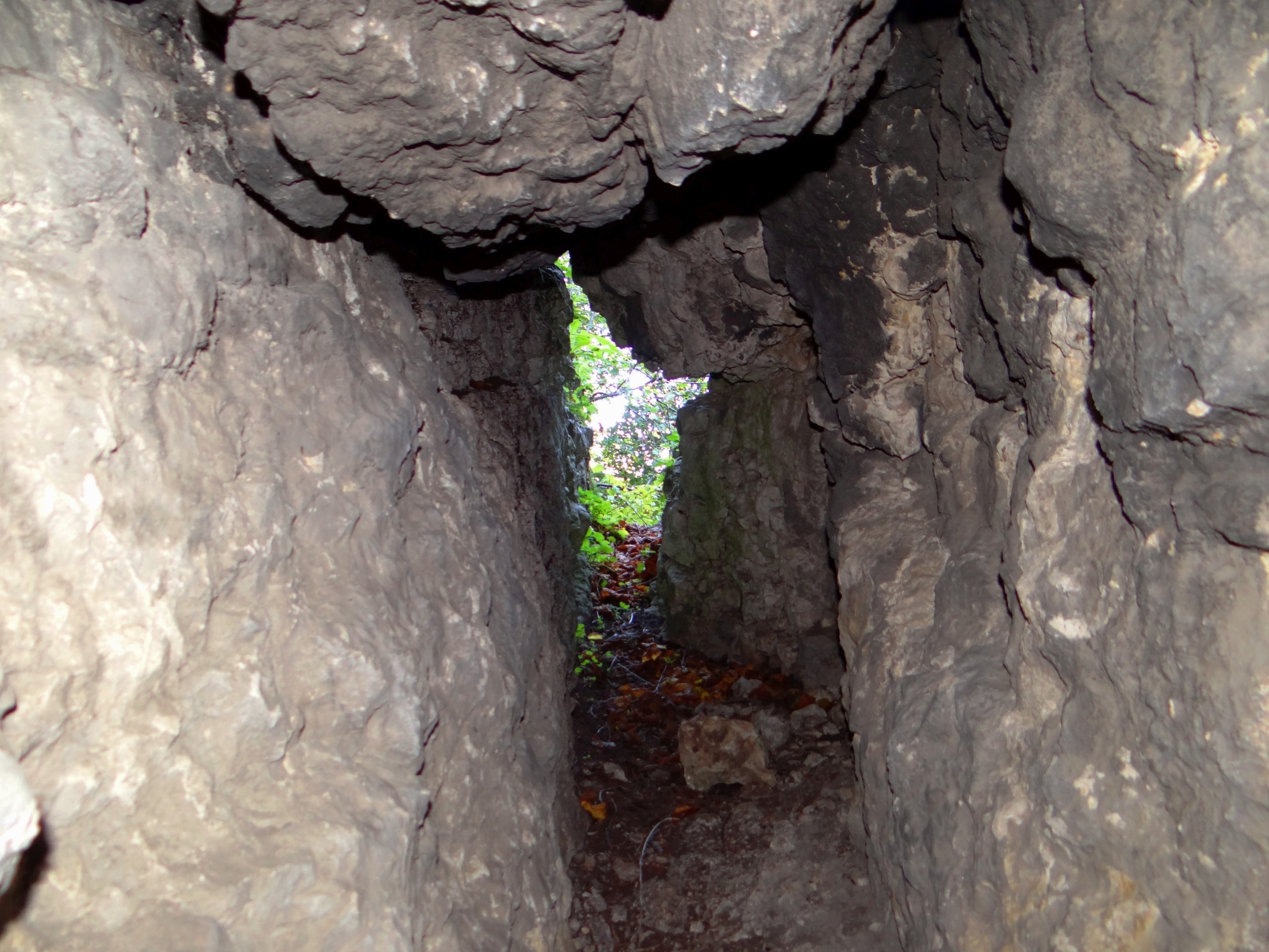 Szczelina za Igłą